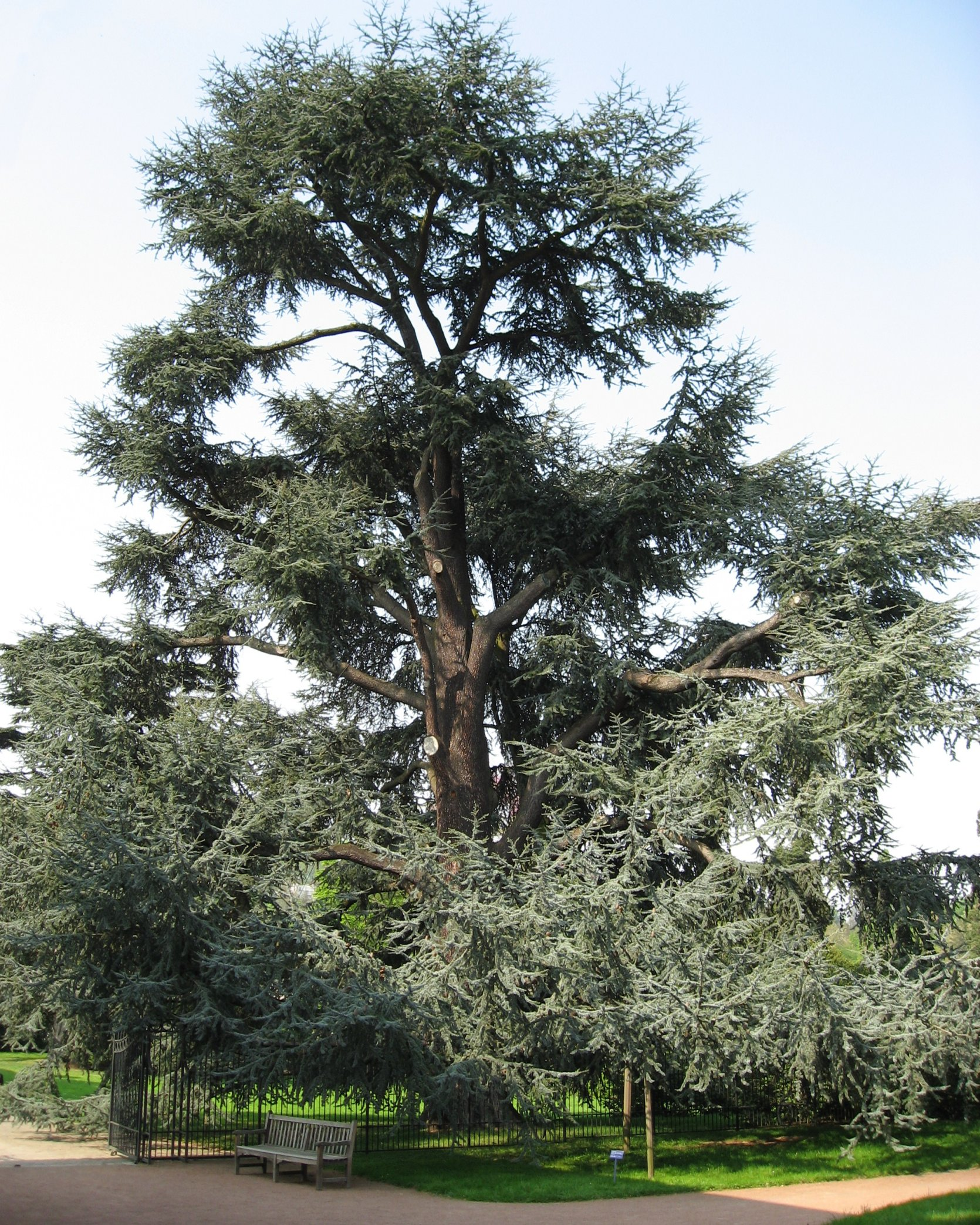 Cedrus libani var. atlantica 'Glauca' in Arboretum de la Vallée-aux-Loups Map: 48° 46' 22" N 2° 16' 5" E